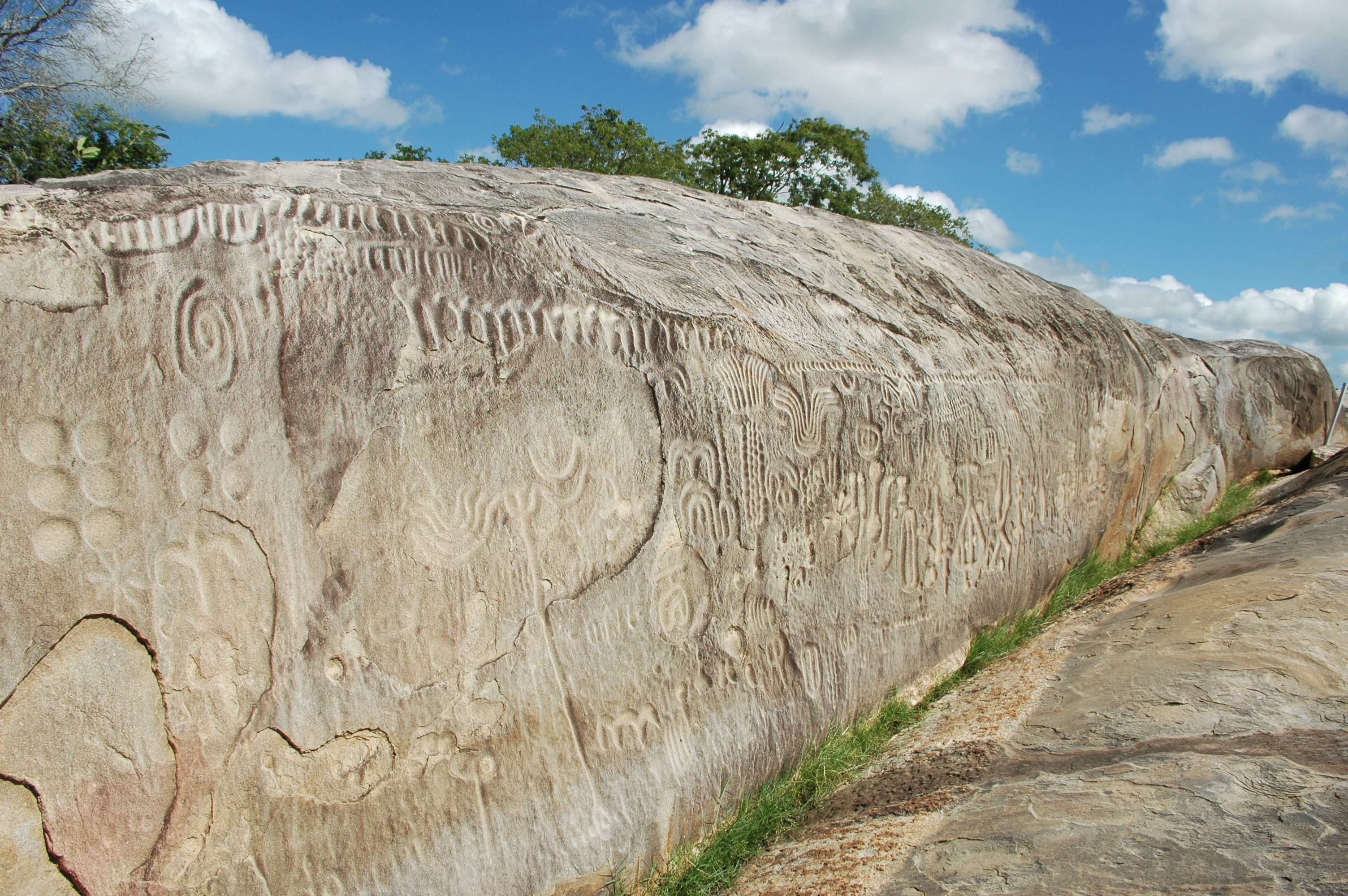 Pedra do Ingá - sítio arqueológico - inscrições rupestres entalhadas na rocha